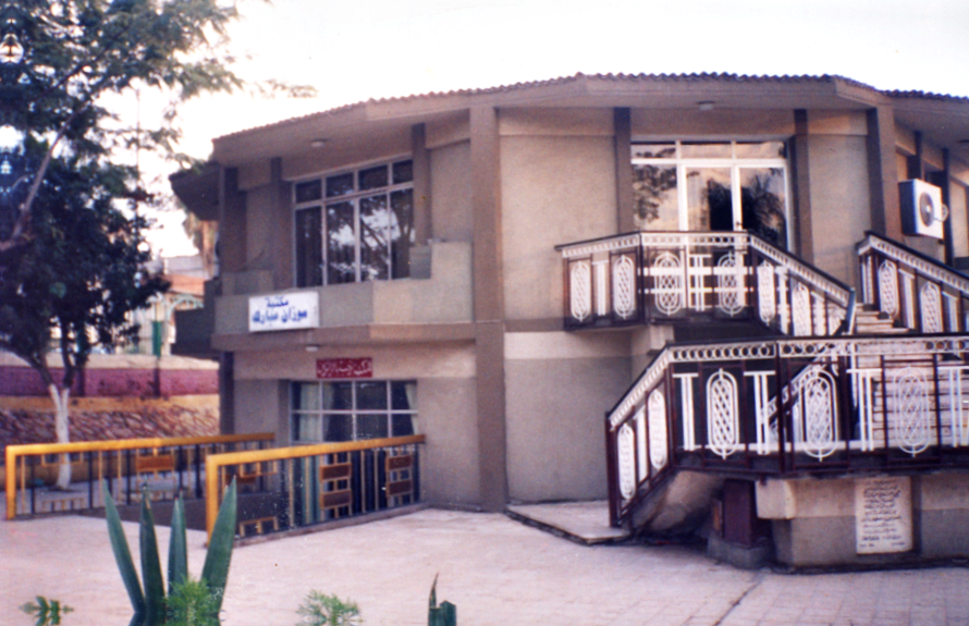 مكتبة سوزان مبارك بدسوق